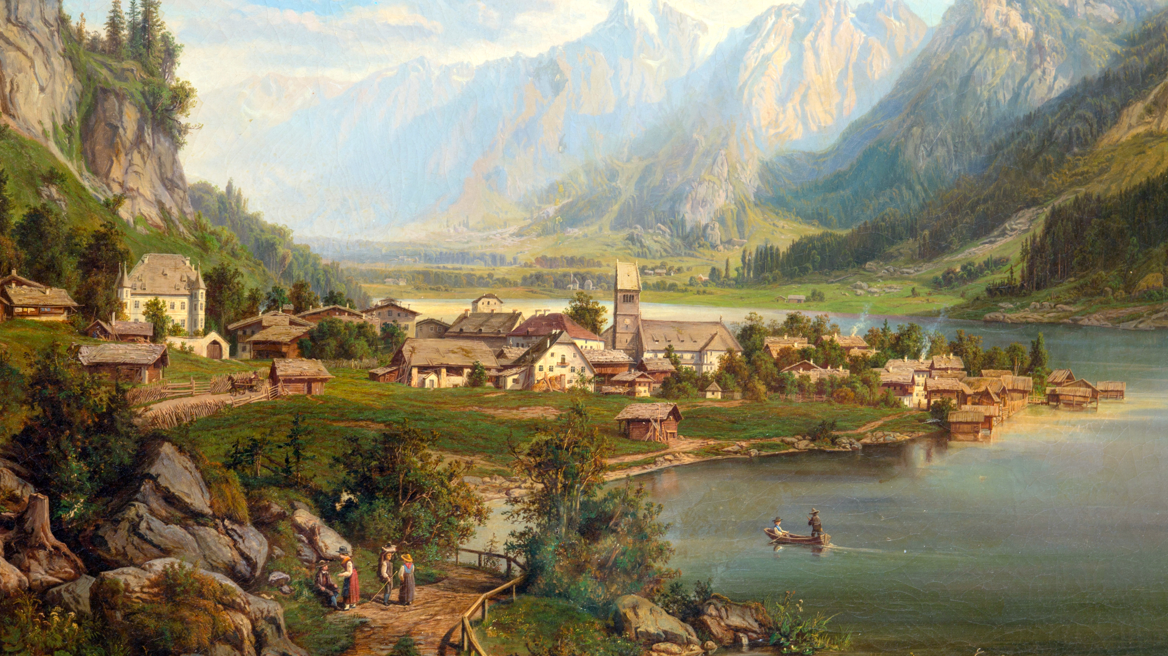 Ölgemälde in Privatbesitz; Ausschnitt